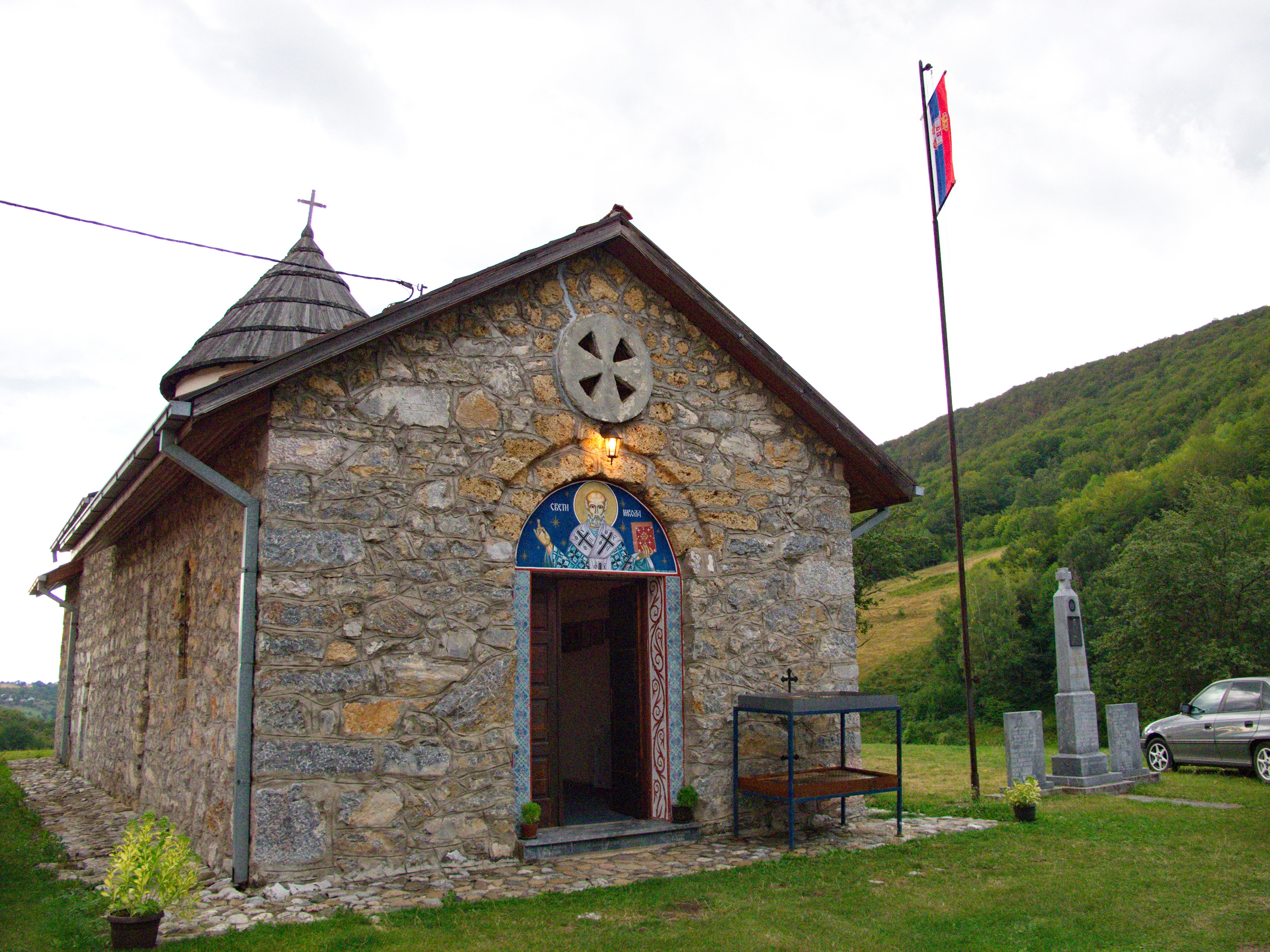 Село Бреково, оштина Ариље.